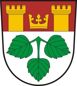 Březová